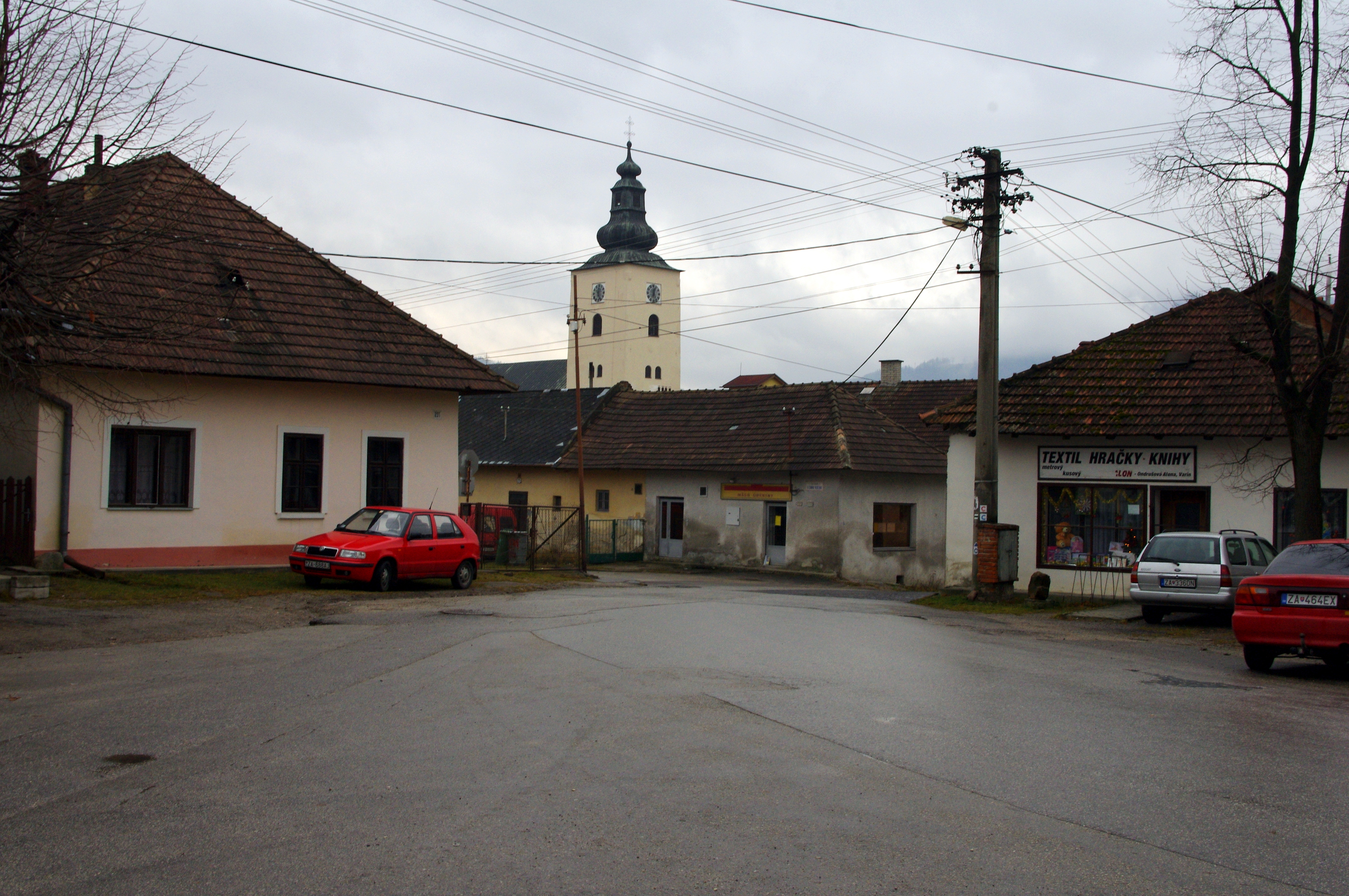 Stred obce